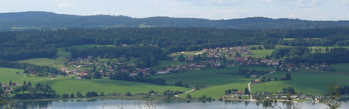 Auteur: Utilisateur:Suaudeau Description: Vue de la commune de Les Grangettes.